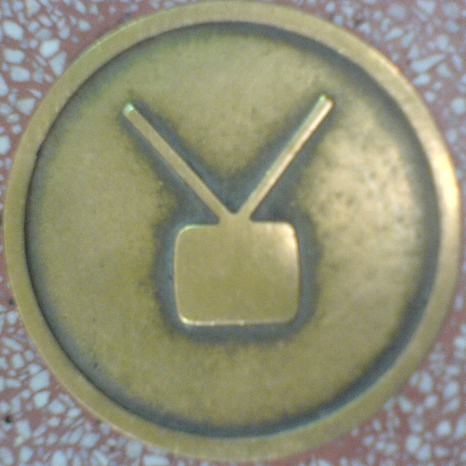 Symbol der Kategorie Fernsehen (television) der Sterne auf dem Hollywood Walk of Fame.